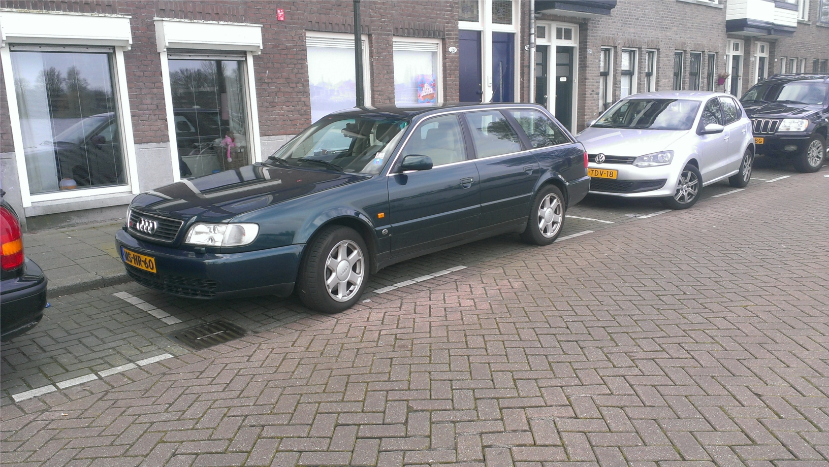 1996 Audi S6 Avant